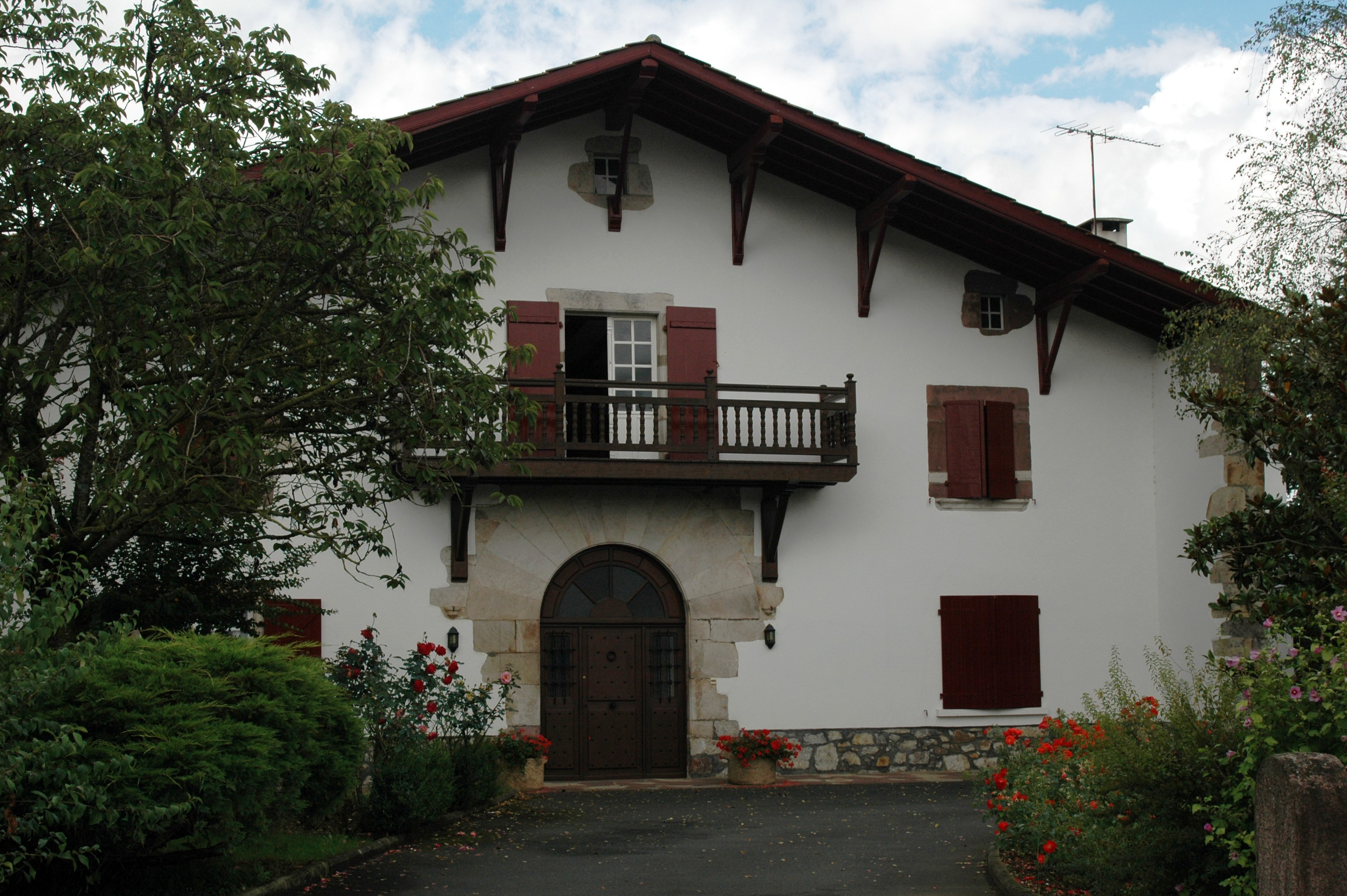 Anhaux - Maison de Basse-Navarre